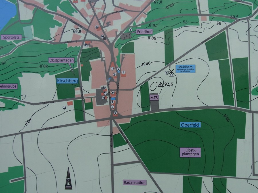 Im Heimatpark Weißagk sind Lage und Geschichte des Ortes Weißagk vor der Abbaggerung dargestellt.